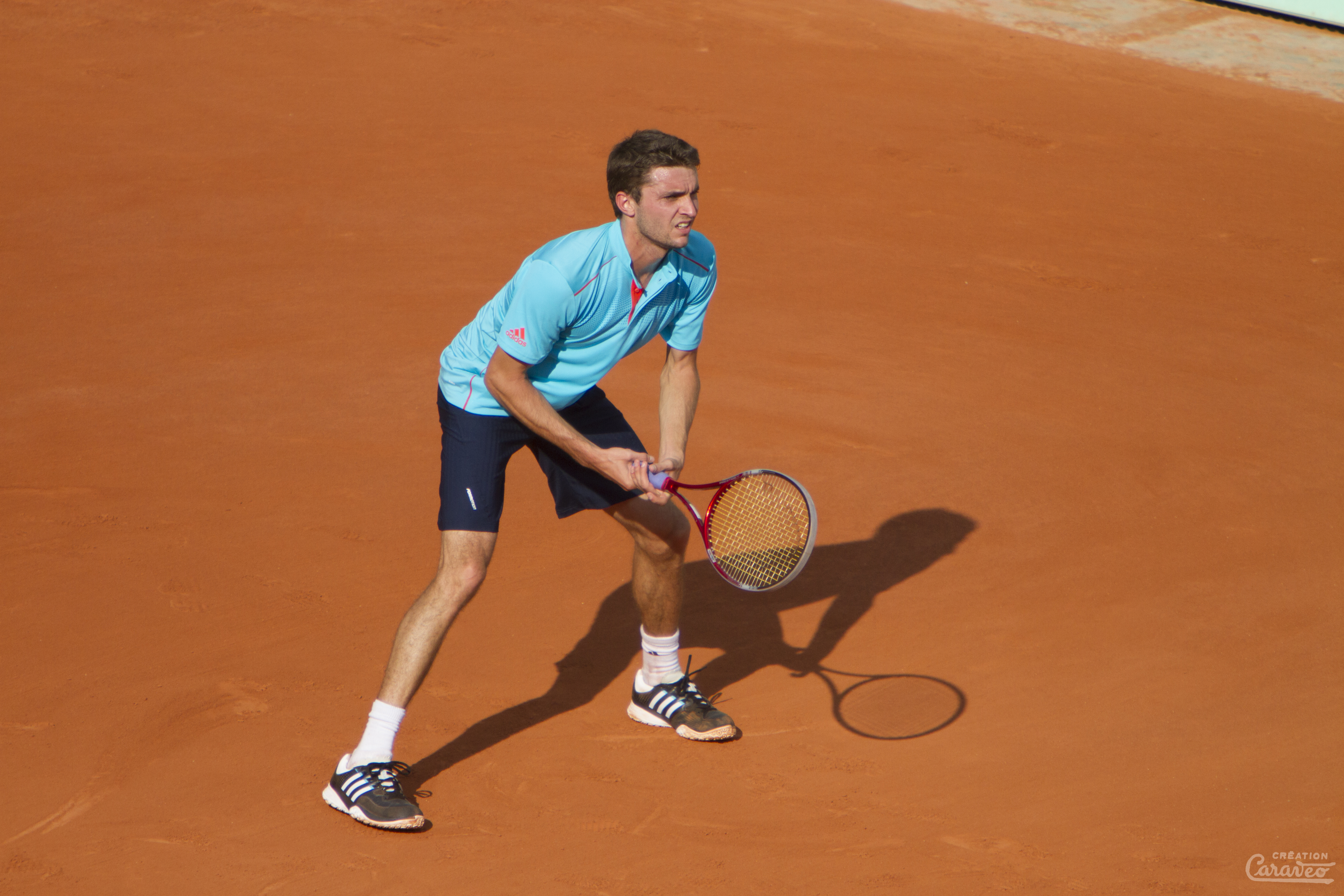 Gilles Simon, Roland-Garros 2012.